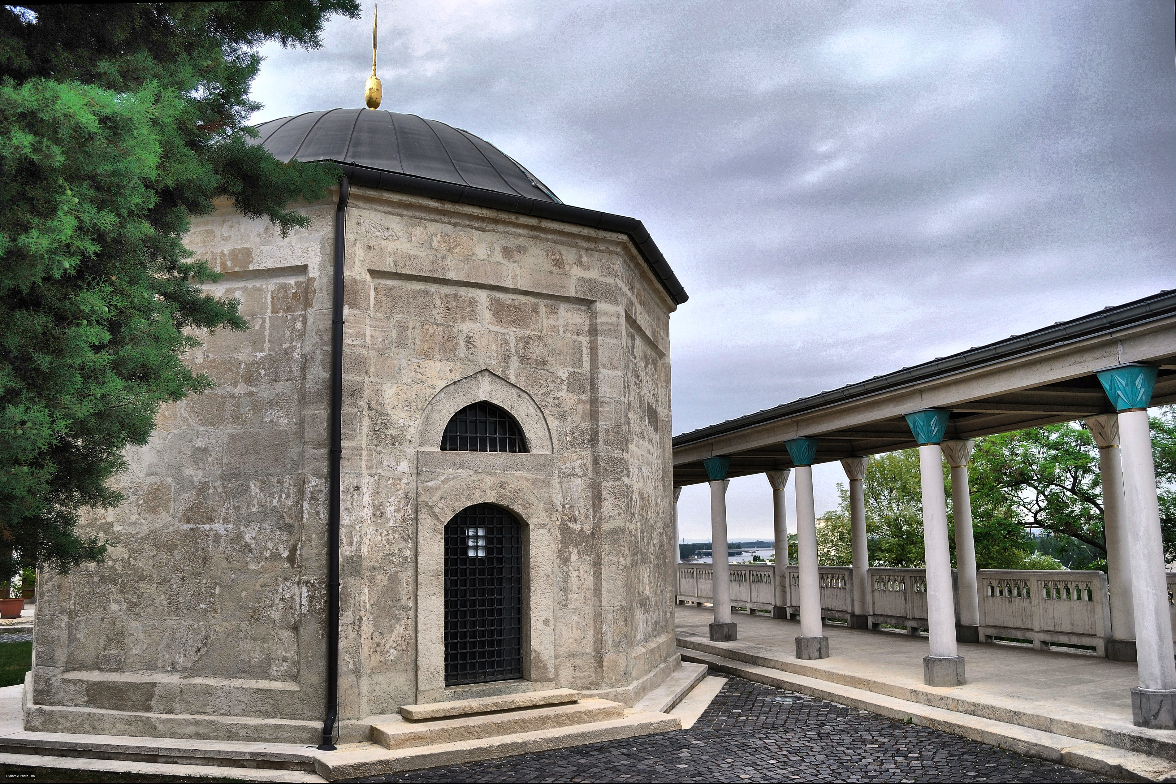 Gül Baba türbéje és az oszlopcsarnok, Budapest II. kerület This is a photo of a monument in Hungary. Identifier: 290